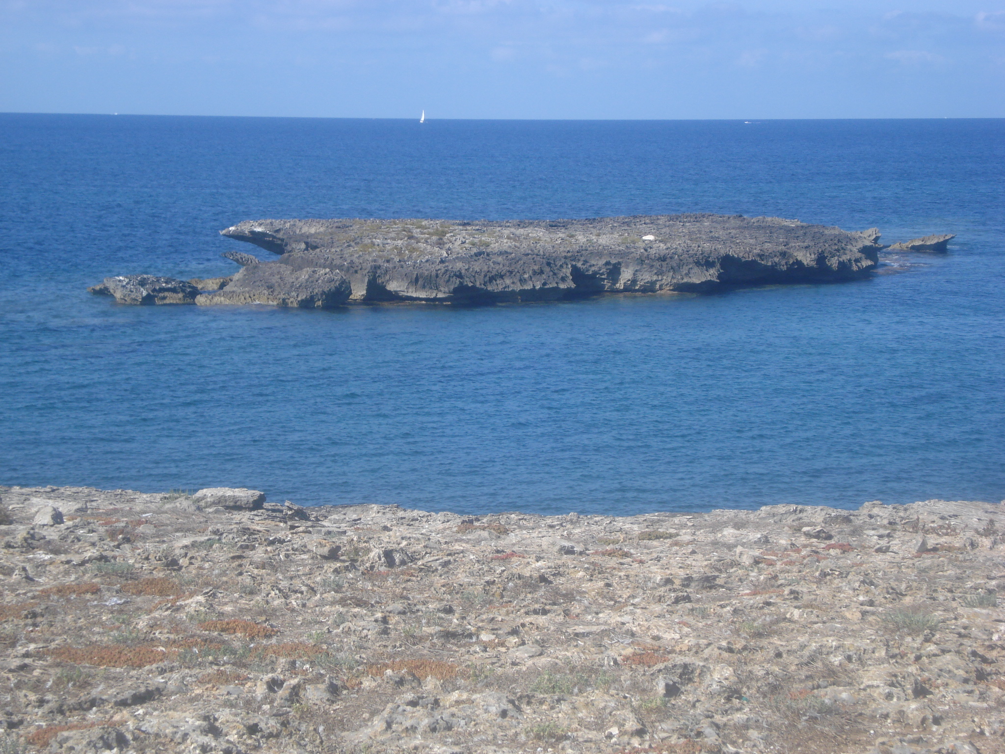 Illot gros de na Moltona vist des de na Moltona